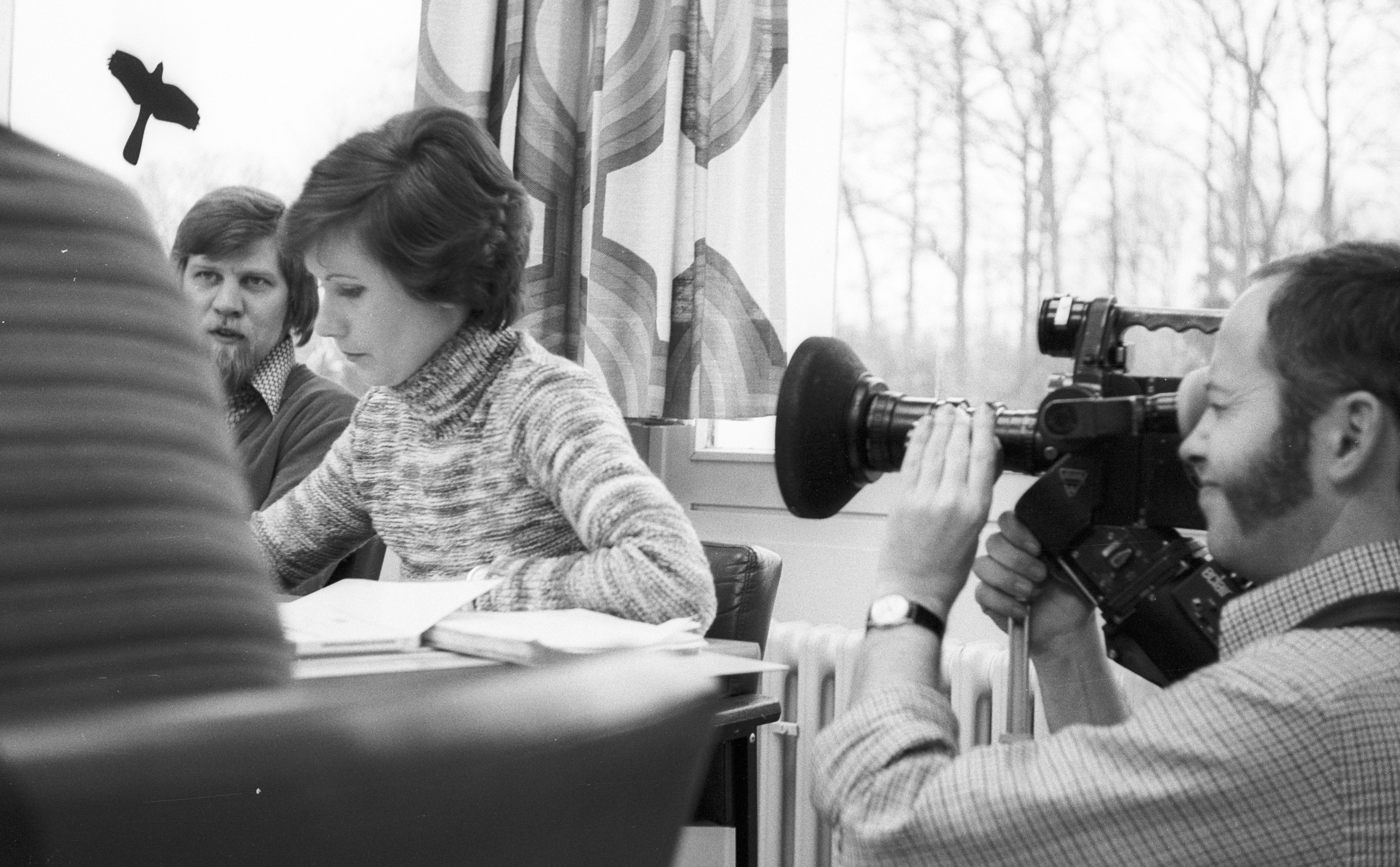 Kameramann Nils-Peter Mahlau filmt die HASPA-Betriebsrätin Anke Scheunemann (die spätere Bundestagsabgeordnete Anke Hartnagel) für einen Beitrag über Betriebsrätinnen für das NDR-Regionalprogramm.